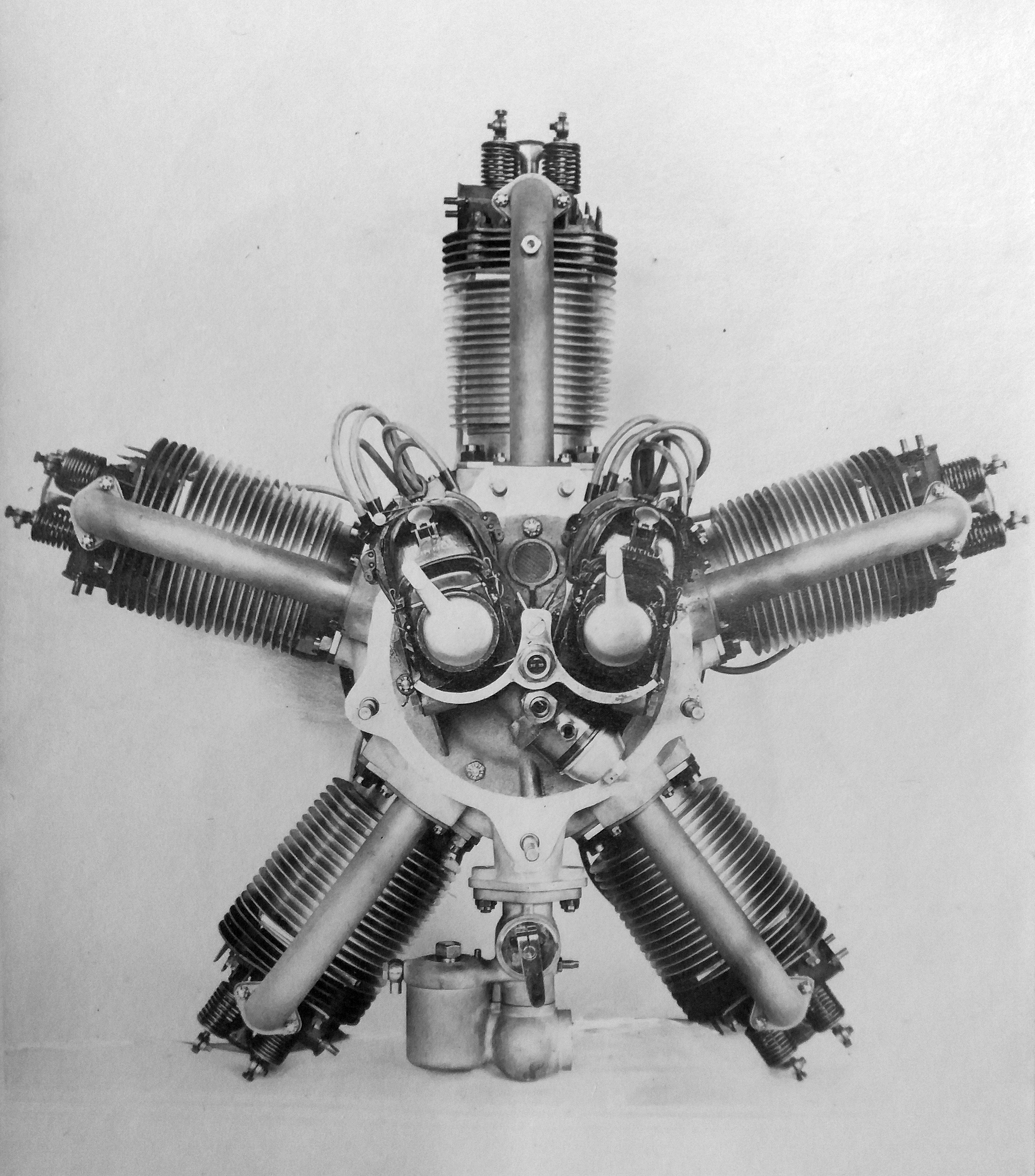 Walter NZ-60 (1923-1930) rear side